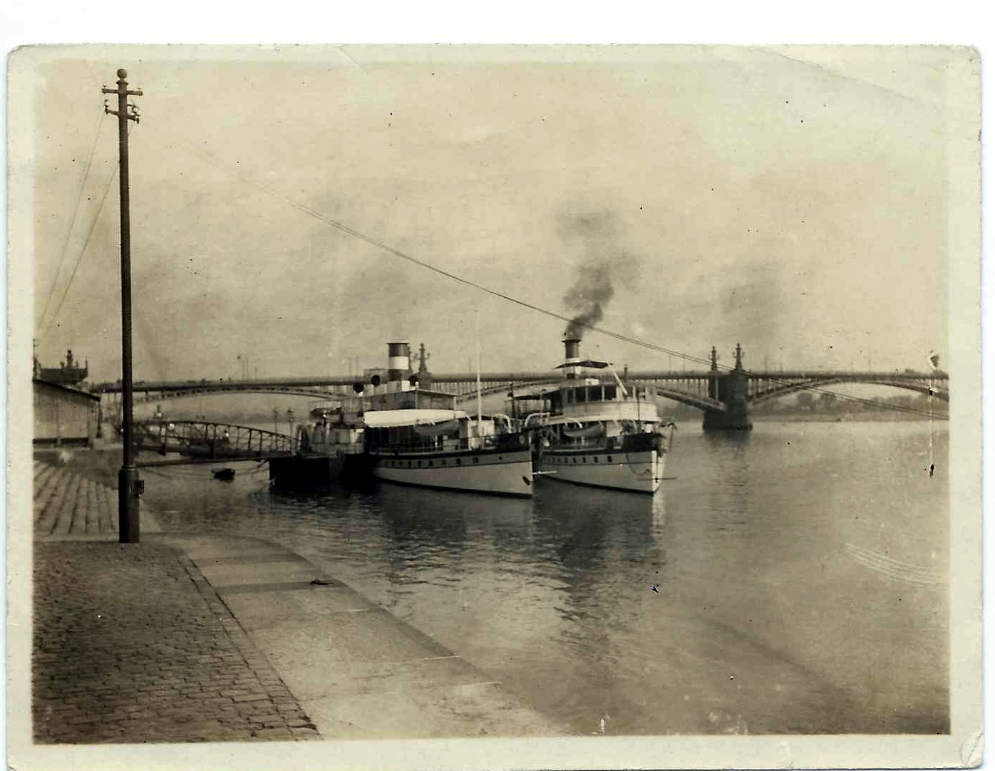 Photo prise le 21 juin 1921 à Mayence par Auguste Auzas